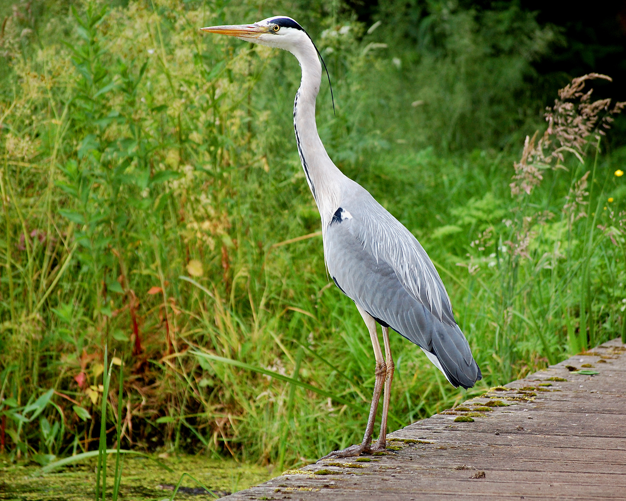 Blauwe reiger